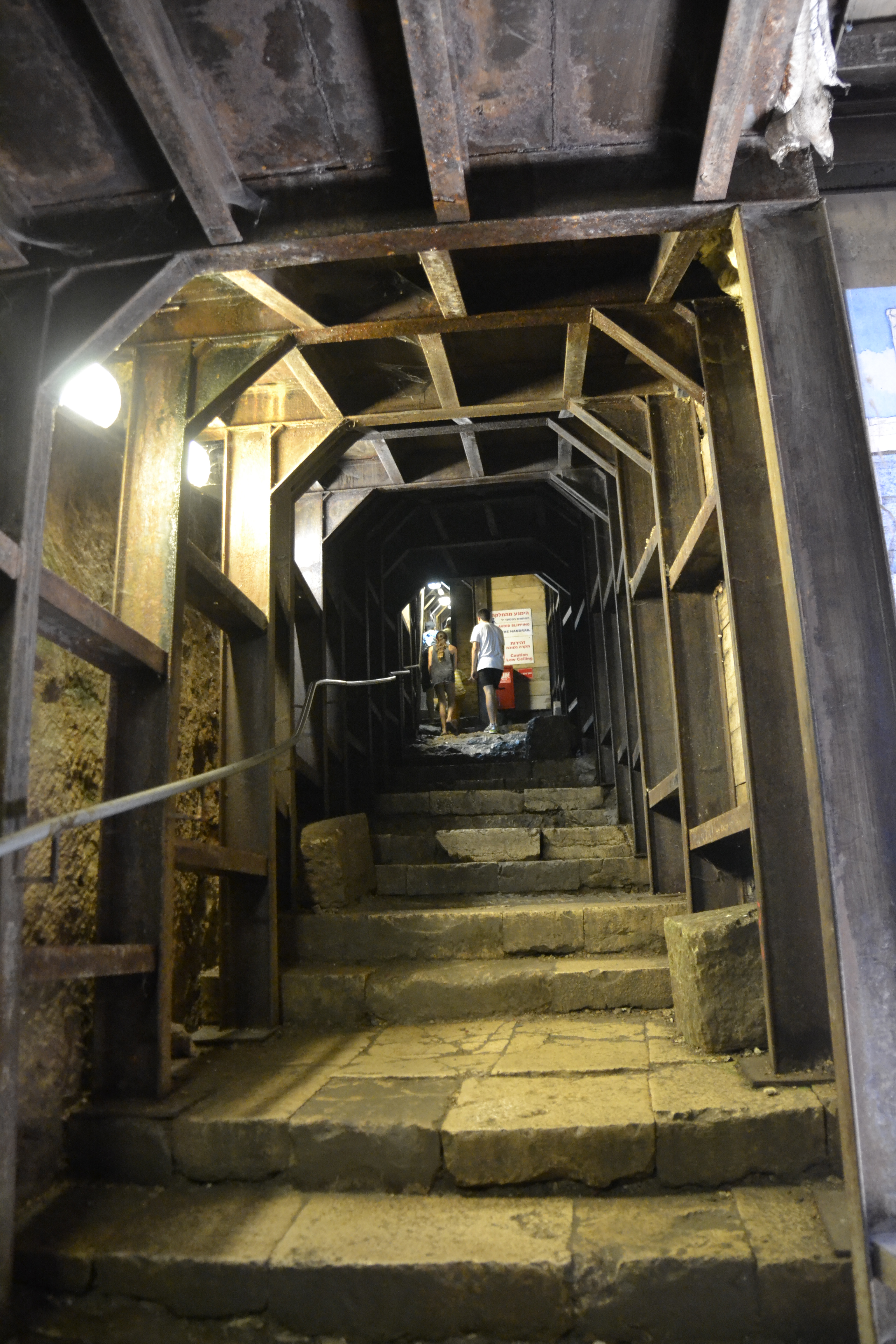 מעלה תעלת הניקוז